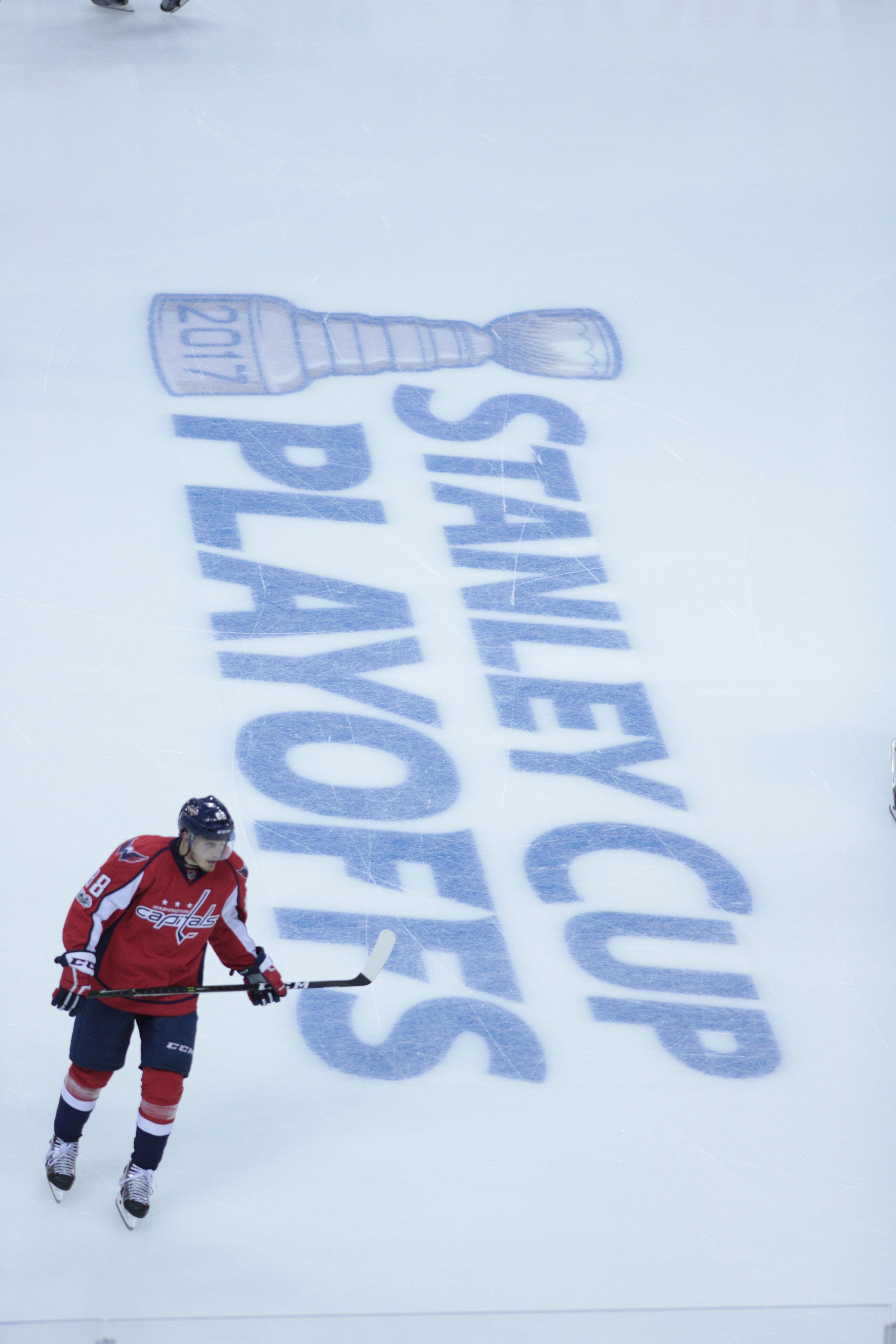 Penguins at Capitals 5/10/17